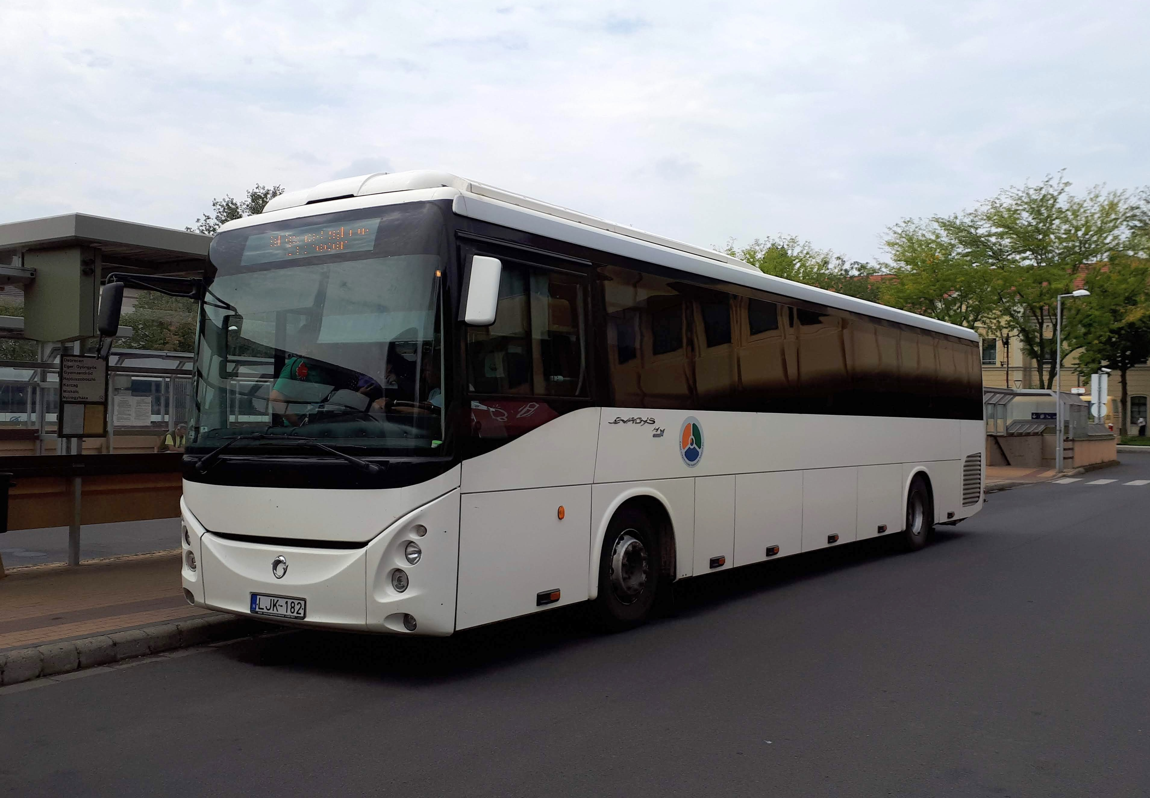 Az ÉMKK LJK-182 rendszámú Irisbus Arway típusú busza Békéscsabán, a 1441-es országos járaton.